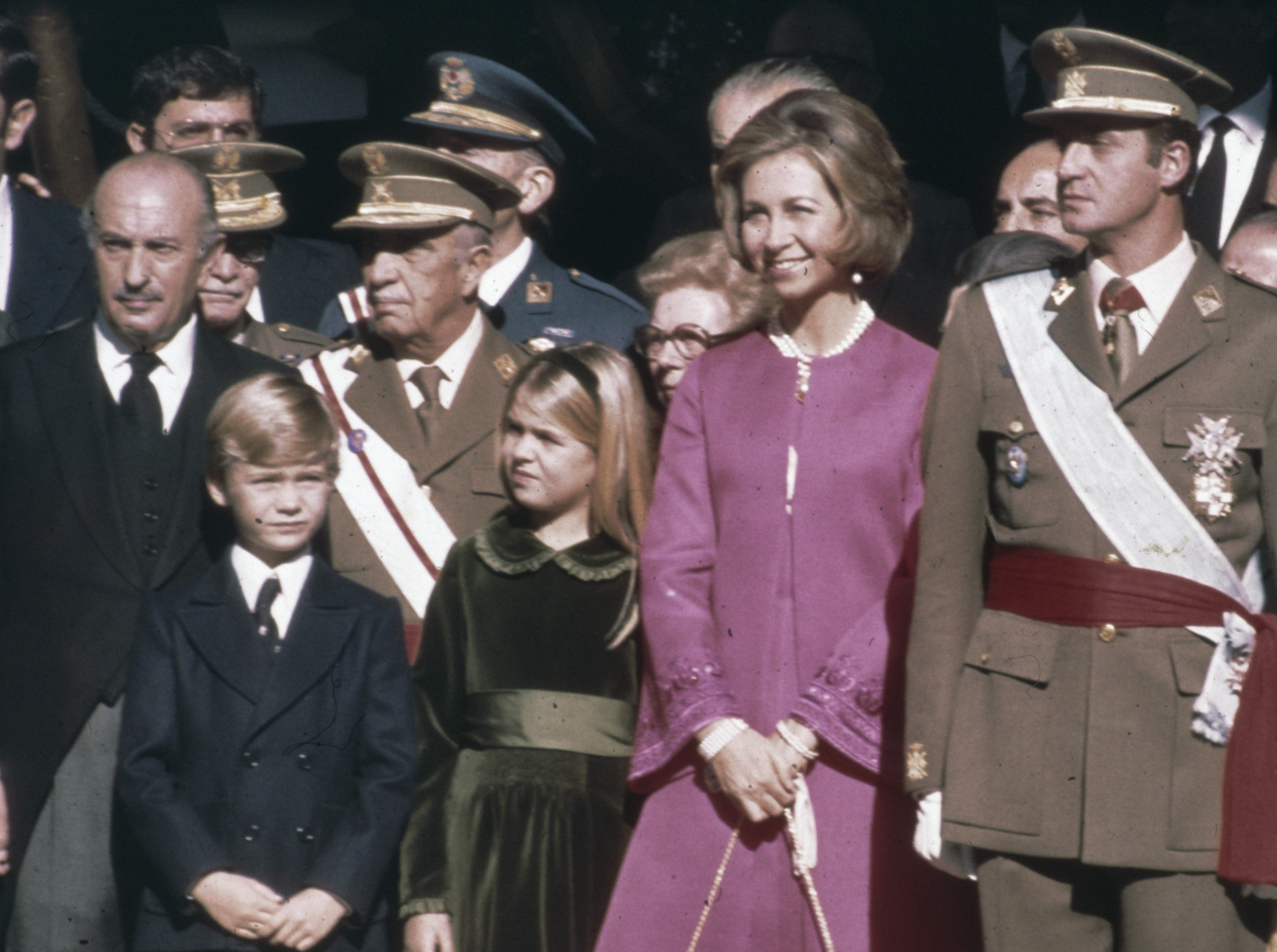 Collectie / Archief : Fotocollectie Anefo Reportage / Serie : [ onbekend ] Beschrijving : De proclamatie en beëdiging van Prins Juan Carlos tot Koning van Spanje tijdens een speciale zitting van de Cortes, het Spaanse parlement, op 22 november 1975. Juan Carlos vertrekt met zijn vrouw en kinderen na afloop van de plechtigheid. Datum : 22 november 1975 Trefwoorden : generaals Persoonsnaam : Franco, Juan Carlos, prins van Spanje Fotograaf : [onbekend] Auteursrechthebbende : Nationaal Archief Materiaalsoort : Dia (kleur) Nummer archiefinventaris : bekijk toegang 2.24.01.07 Bestanddeelnummer : 254-9764